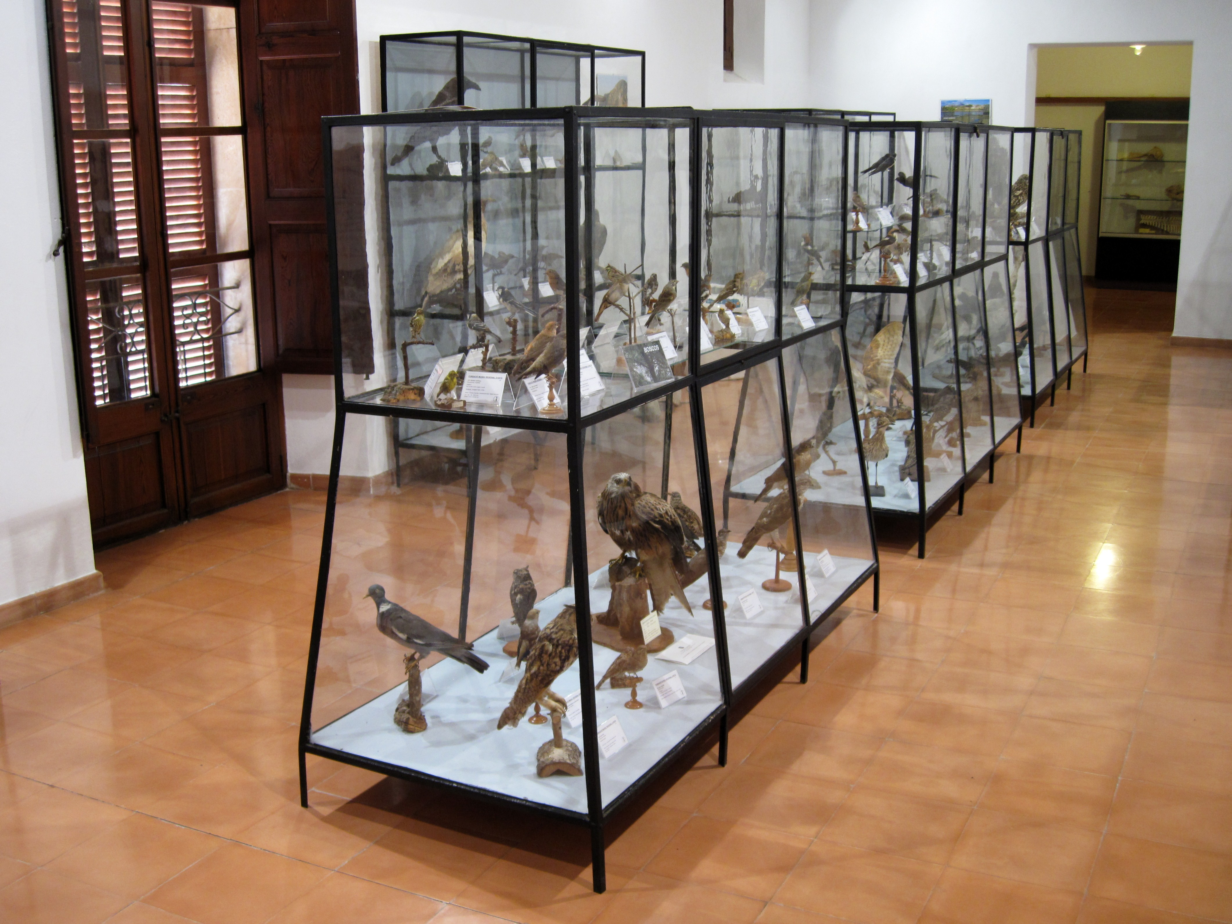 Raum der naturgeschichtlichen Sammlung im Regionalmuseum von Artà (Museu Regional d’Artà), Gemeinde Artà, Mallorca, Spanien